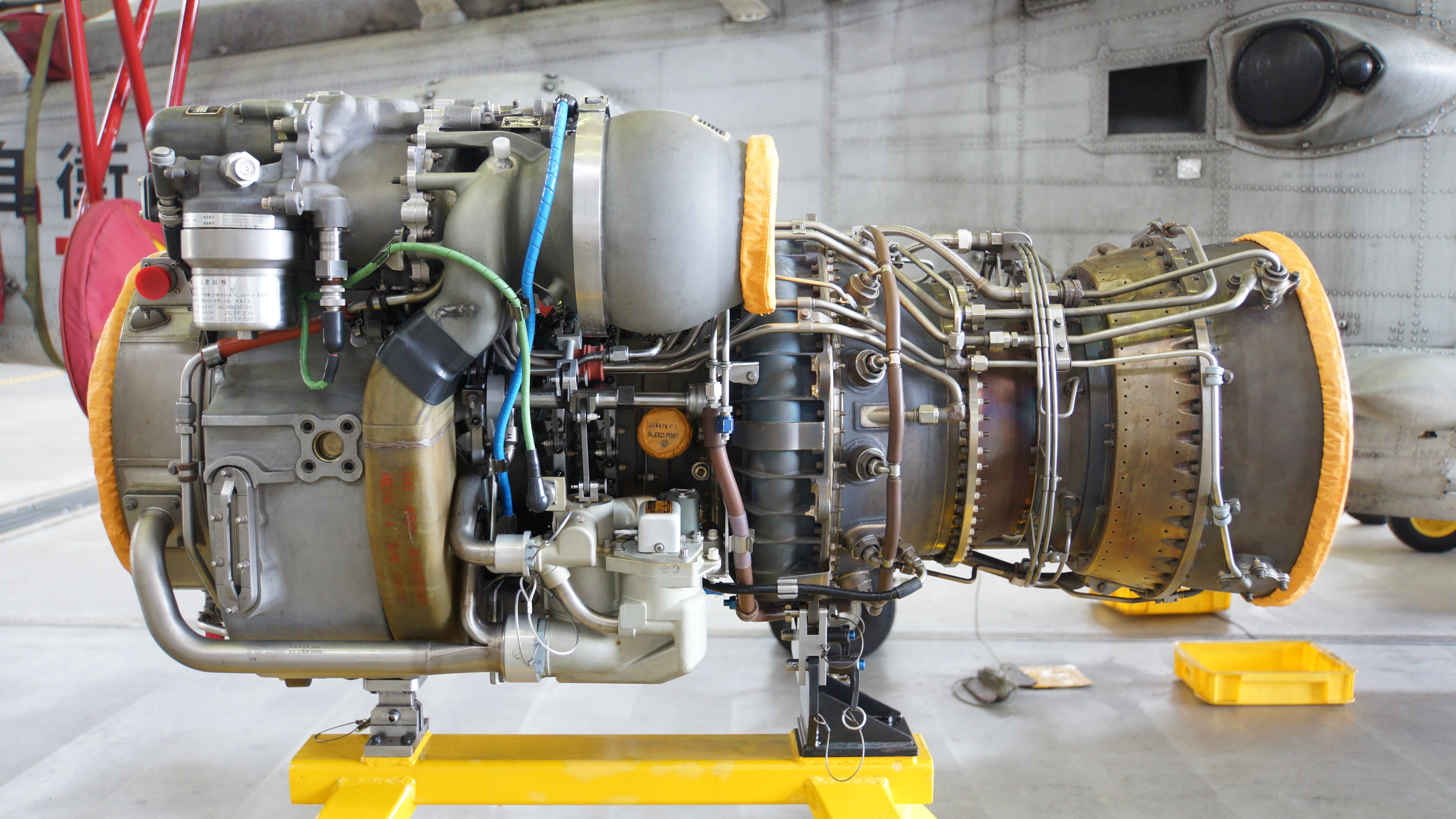 海上自衛隊 T700-IHI-401C2ターボシャフトエンジン（SH-60K哨戒ヘリコプター用） 左側面部。2016年7月16日 舞鶴航空基地にて。